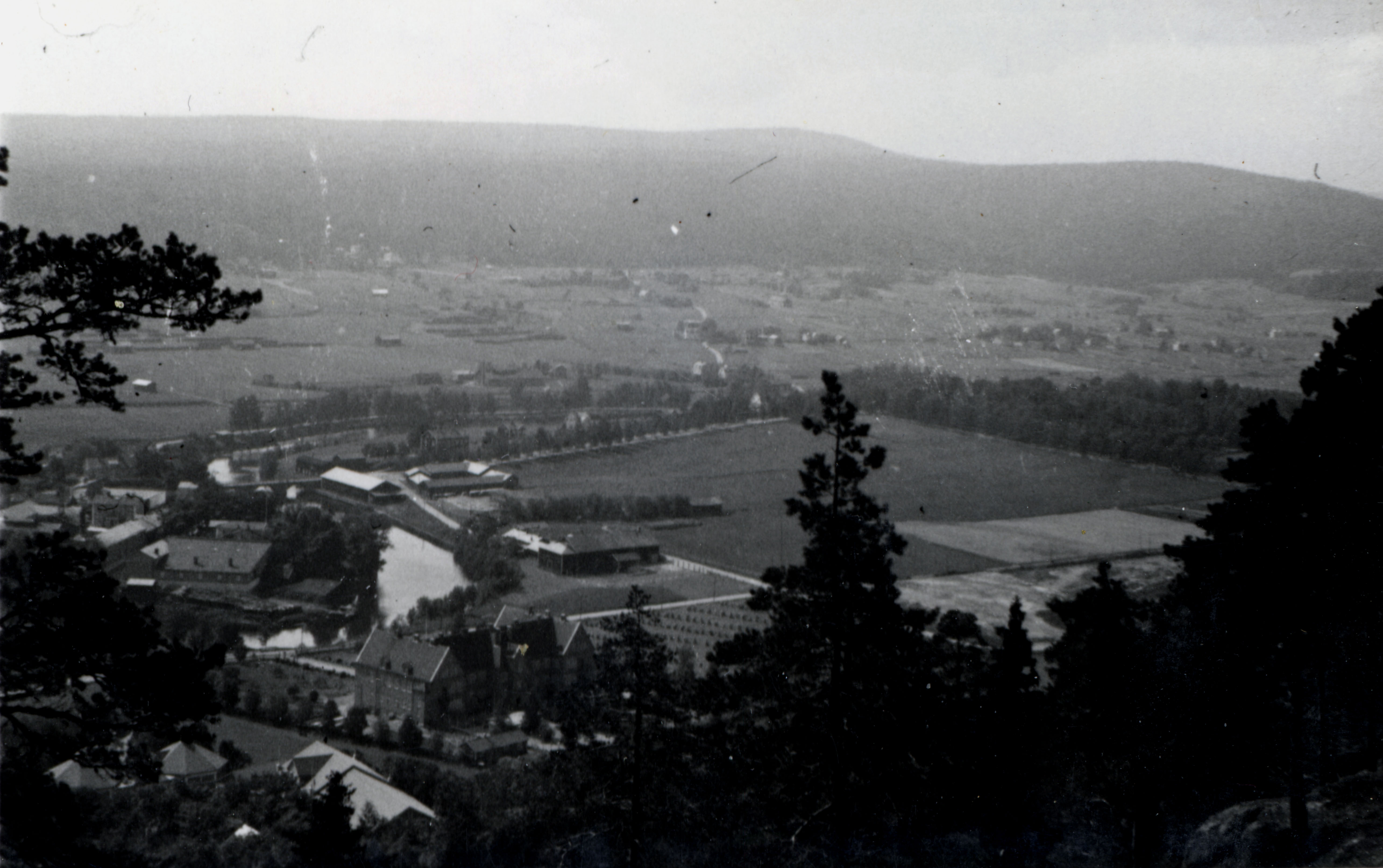 Åkroken och Västhagen innan Campus Sundsvall, Västermalms gymnasium och Tonhallen, fotograferad augusti 1936 från Norra stadsberget. Svartvitt foto.